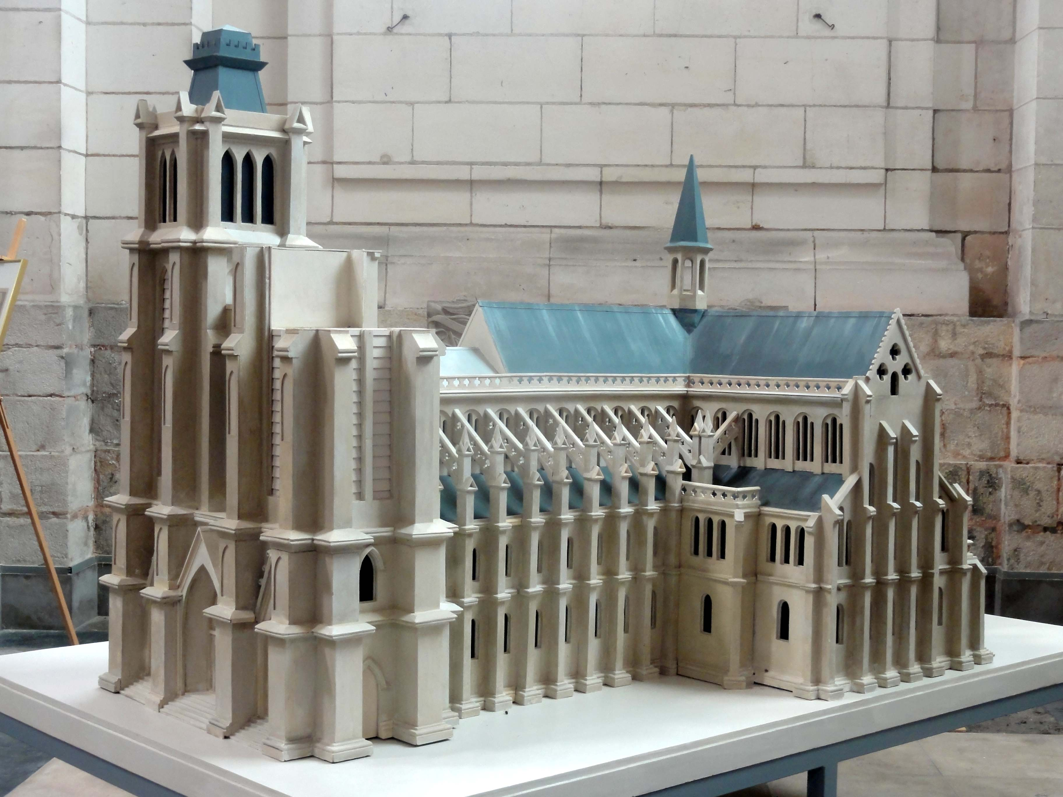 Maquette du XVIIIe siècle de la cathédrale Notre-Dame-en-Cité d'Arras, retrouvée vers la fin du XXe siècle dans les combles de la cathédrale Saint-Vaast et exposée aujourd'hui dans cette cathédrale. La ressemblance avec l'édifice original n'a pu être vérifiée en raison du manque de précision des sources.